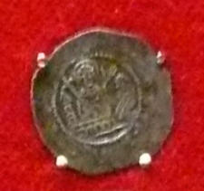 denár knížete Bedřicha